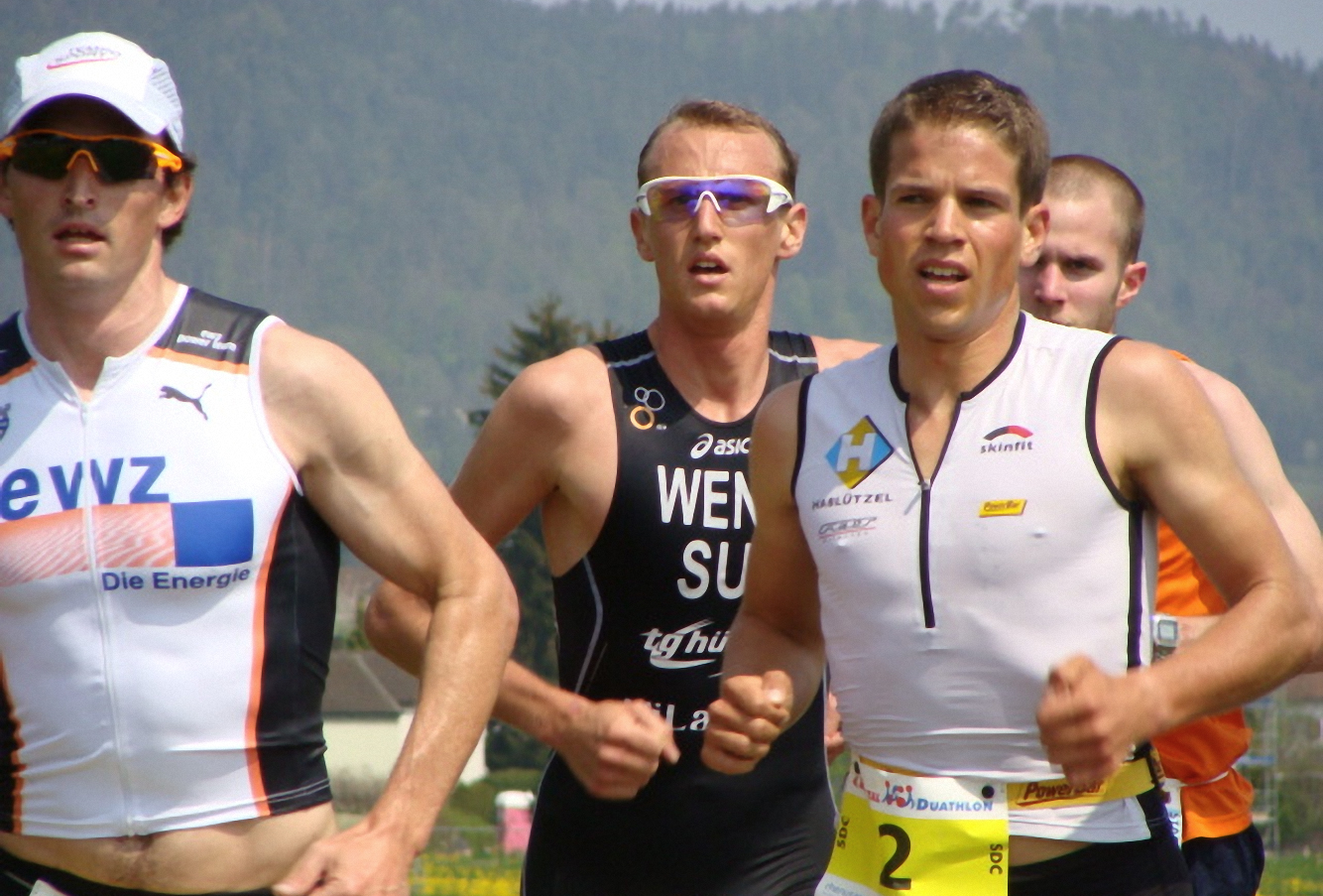 Rheintal Duathlon 2010 – mit Ronnie Schildknecht, Stephan Wenk und Andy Sutz an der Spitze